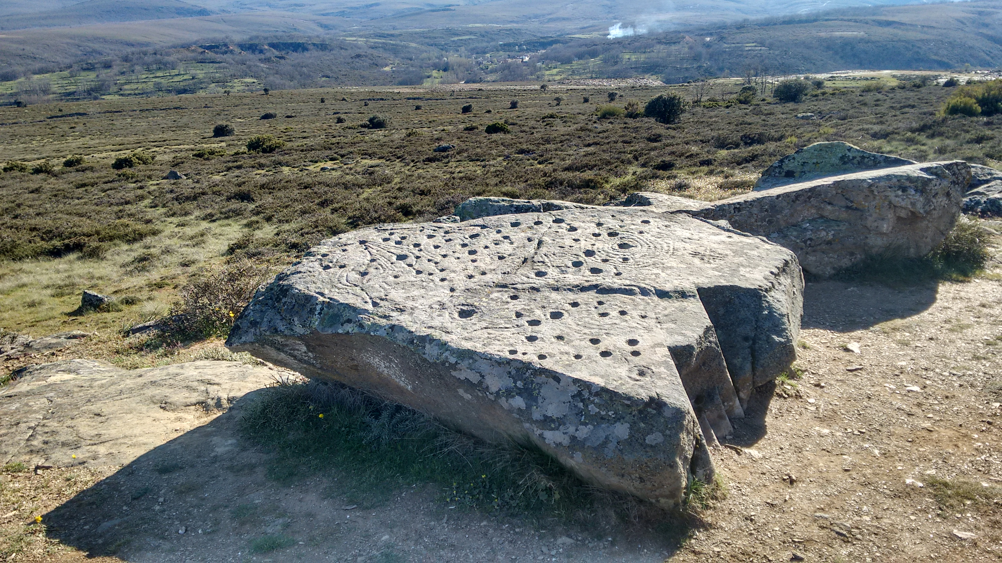 Petroglifos de Peña Fadiel, en Filiel (León, España).